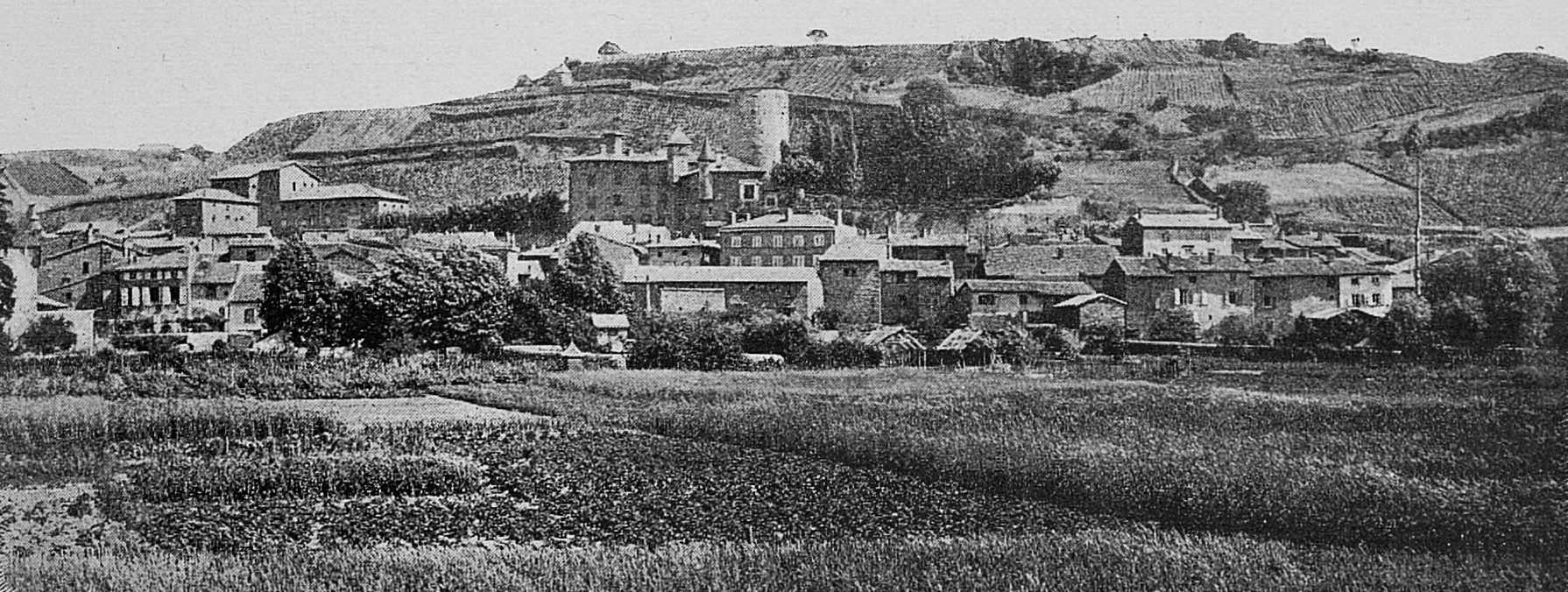 Dictionnaire illustré des communes du département du Rhône. Tome 1 / par MM. E. de Rolland et D. Clouzet.